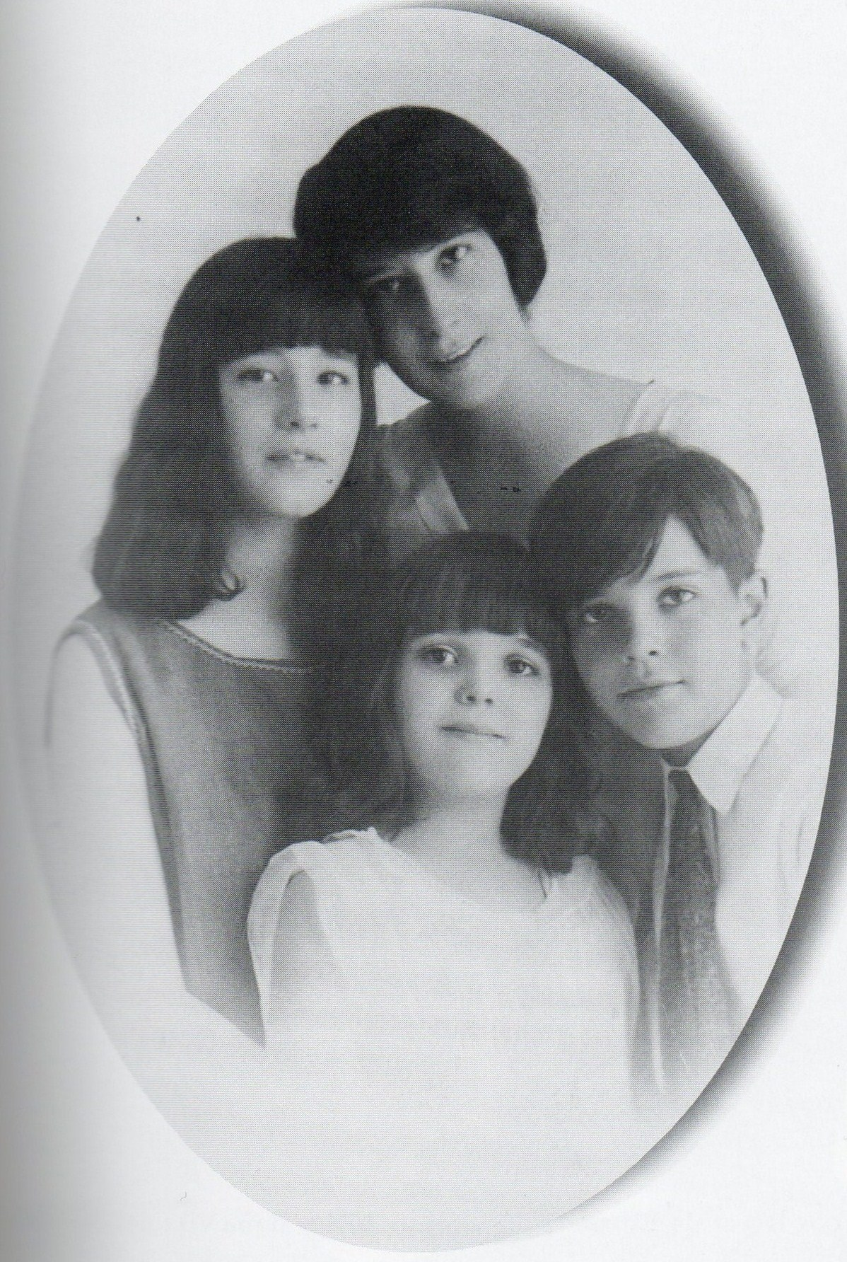 La Princesa Vittoria Ruspoli con sus tres hijos, hacia 1922.